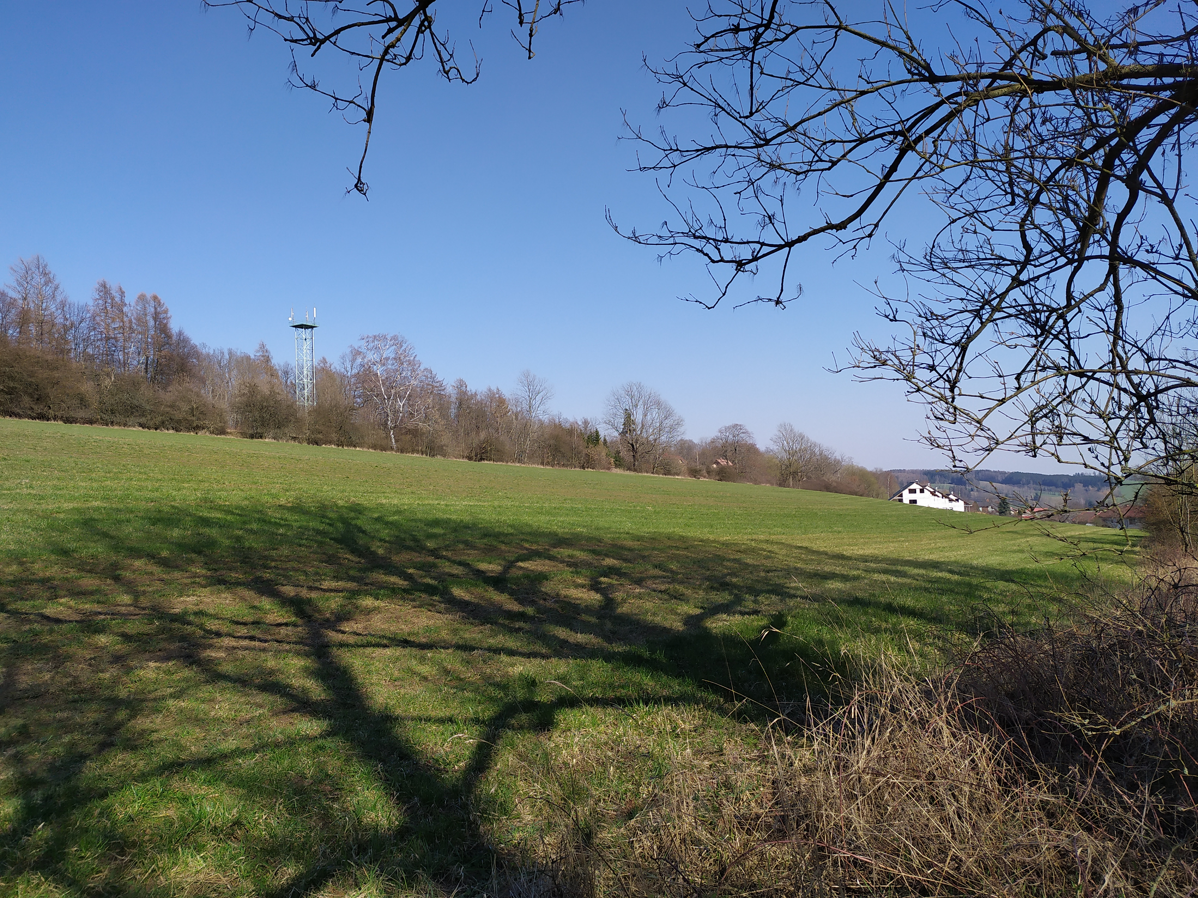 Vrchol Kozinec s vysílačem